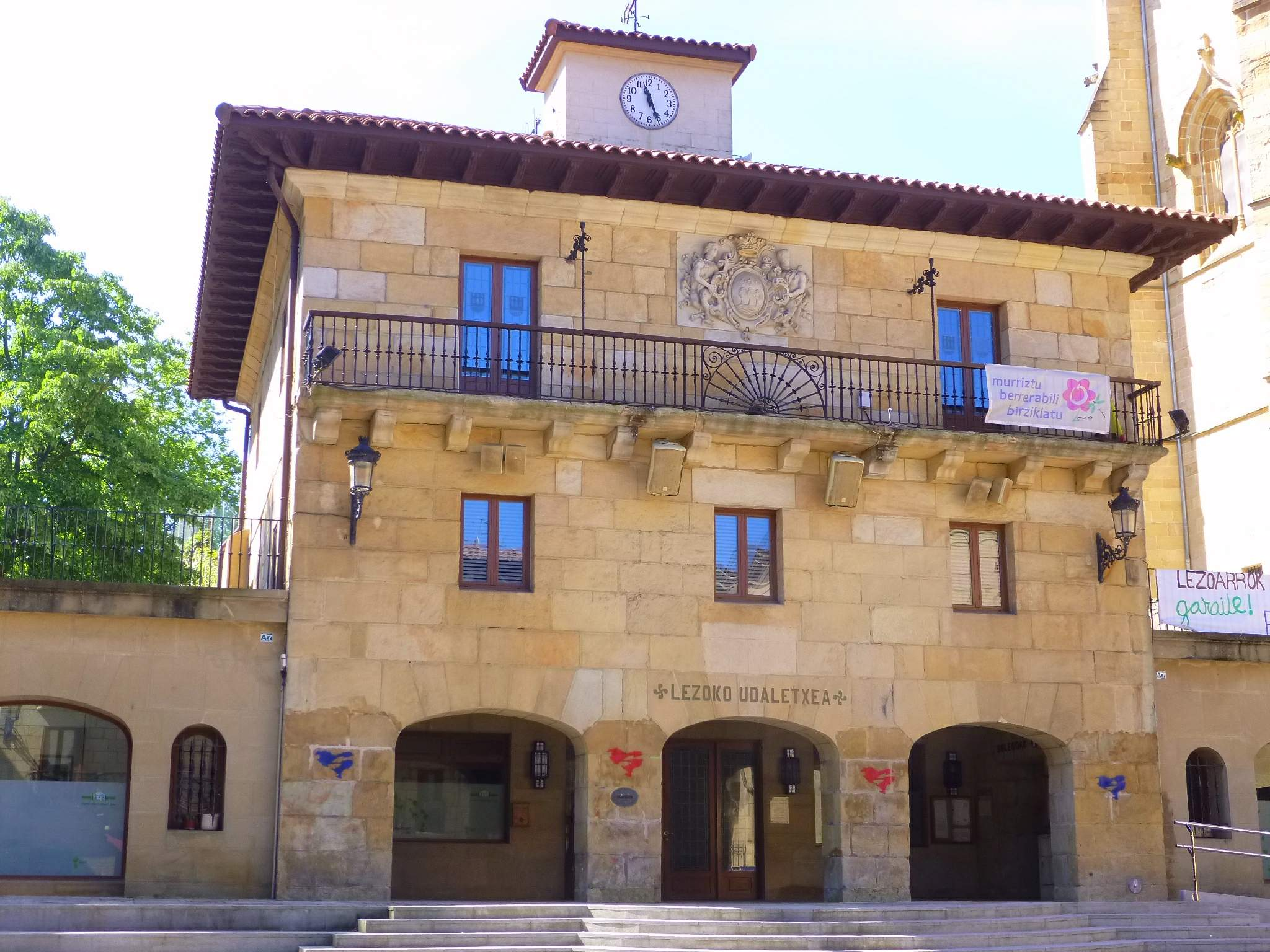 Ayuntamiento de Lezo (Guipúzcoa)